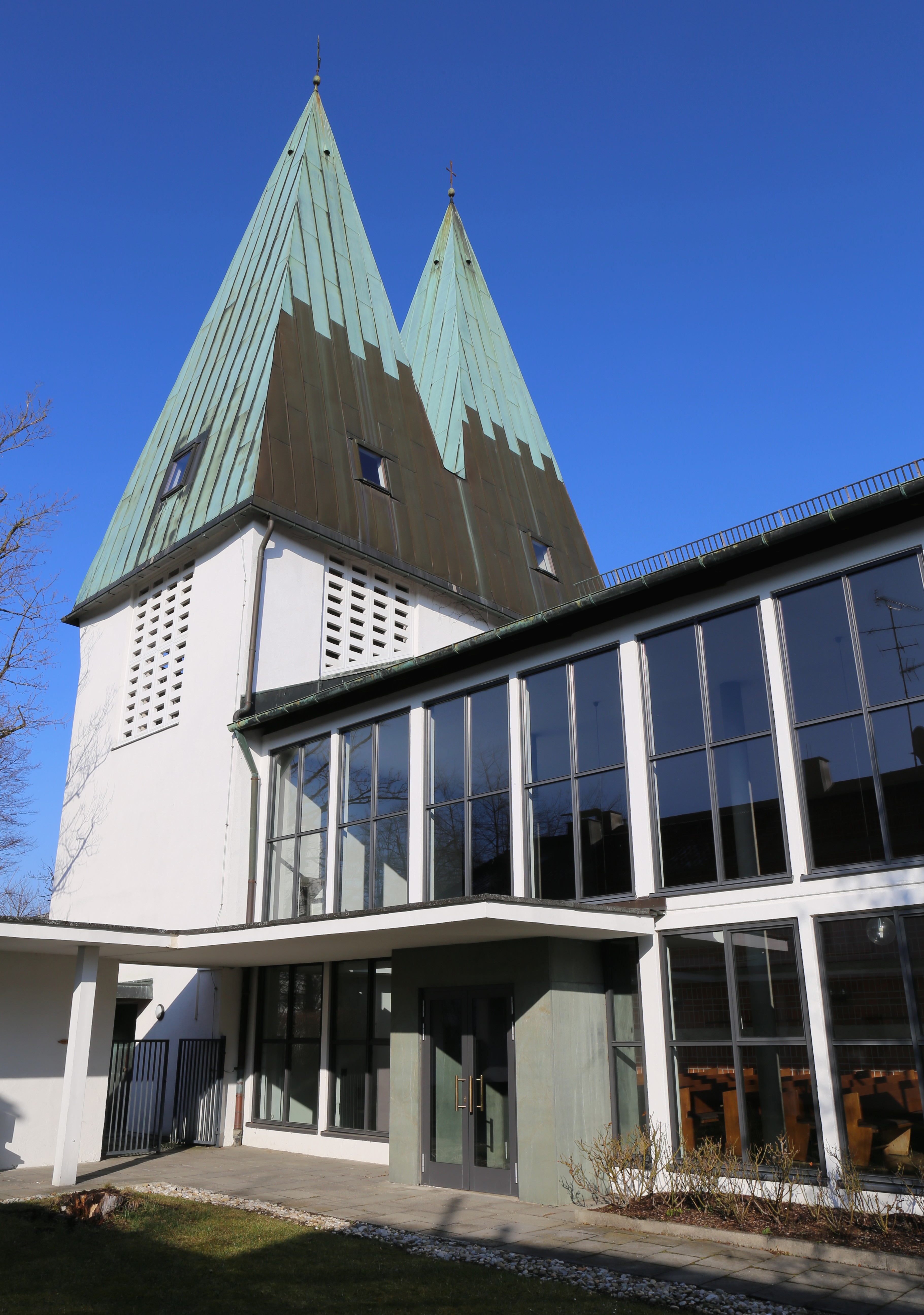 Hugo-Troendle-Straße 53, Moosach, München; evangelisch-lutherische Heilig-Geist-Kirche. Die Kirche und das Pfarrhaus wurden nach Plänen und Entwurf von Christoph von Petz in den Jahren 1957 bis 1958 errichtet. Die Grundsteinlegung fand am 1. Dezember 1957 statt. Die Weihe des Gotteshauses wurde am 2. November 1958 vollzogen. Bauzeitlich trug der Straßenzug noch den Namen Maria-Ward-Straße. Das Bauwerk trug die Hausnummer 125.